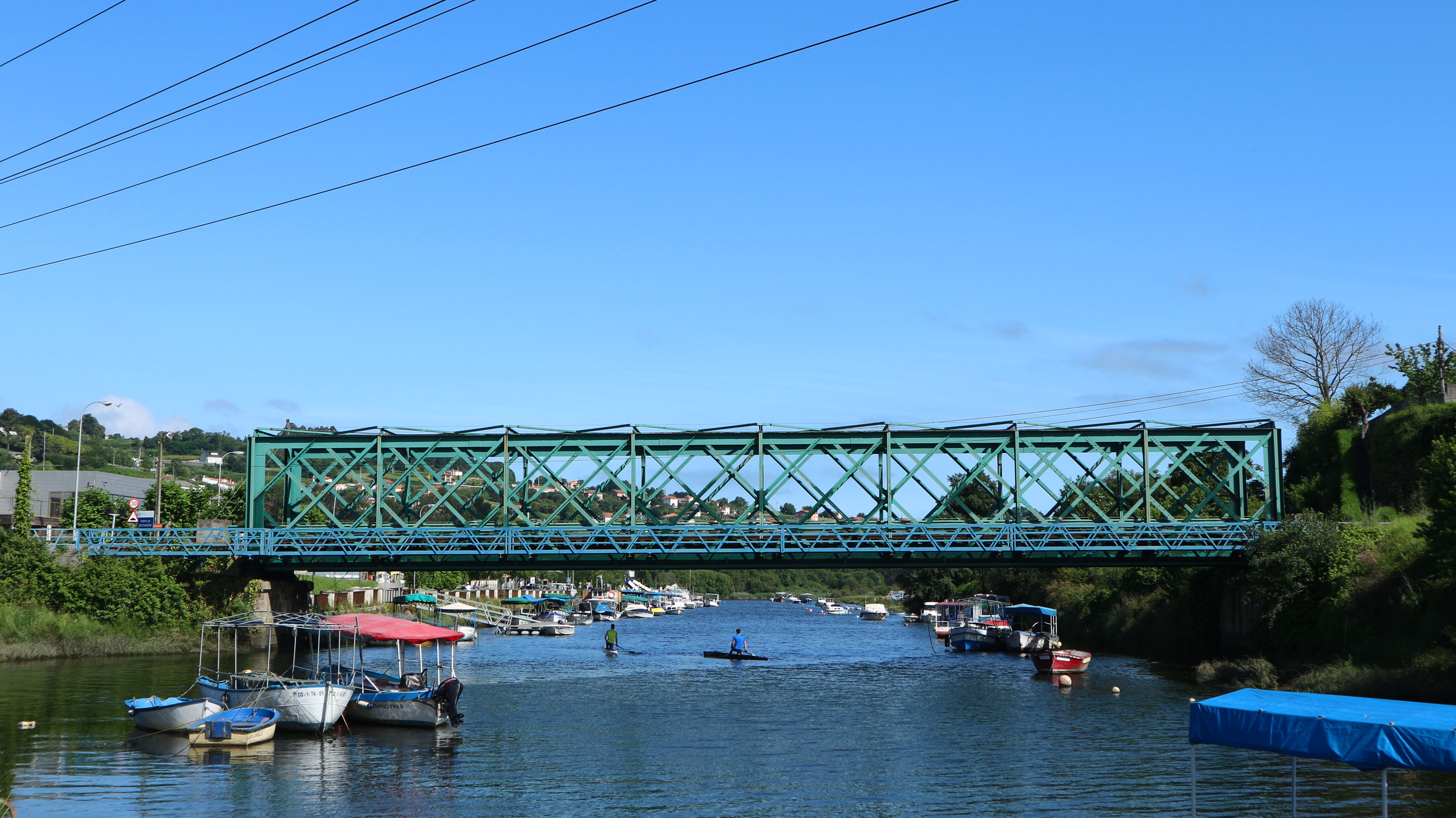 Betanzos e a súa ribeira nos ríos Mandeo e Mendo.